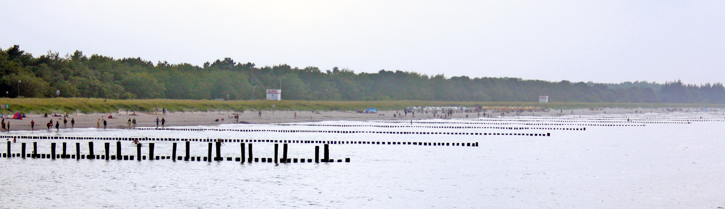 Buhnen an der Ostseeküste im Bereich des Ortes Zingst